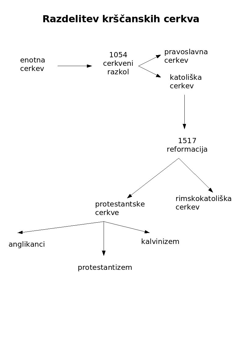 Razcvoj in razdelitev krscanskih cerkev